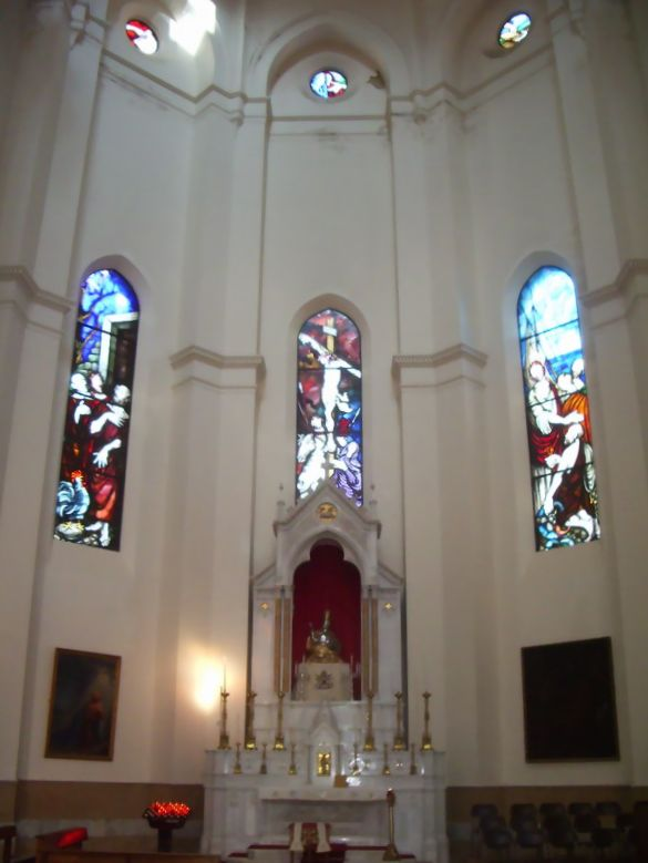 Abside sinistro del Duomo Tonti.